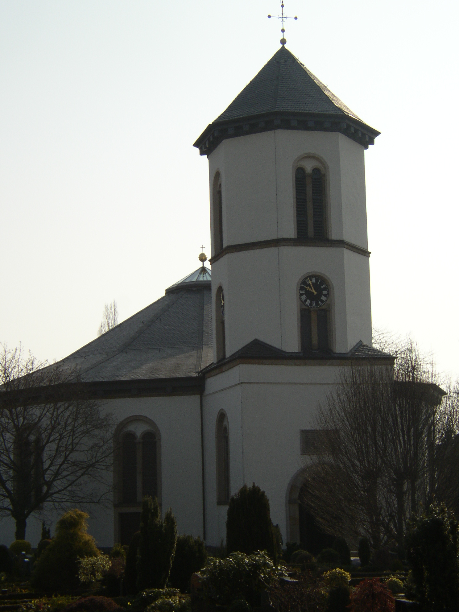 Kirche „St. Petrus zu den Ketten“ von EmanuelBruno Quaet-Faslem in Gesmold